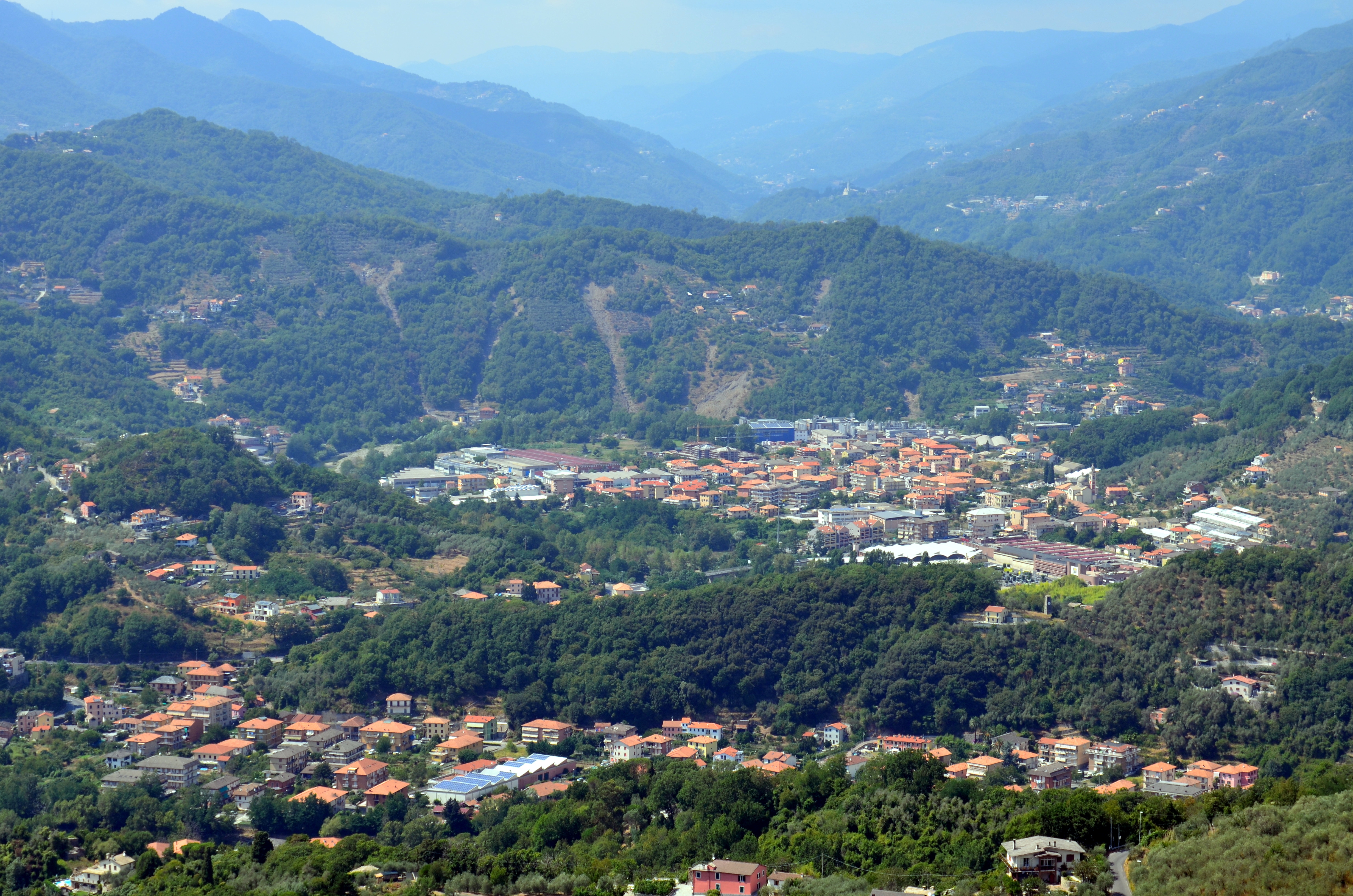 Panorama di Carasco dal monte San Giacomo di Cogorno, Liguria, Italy